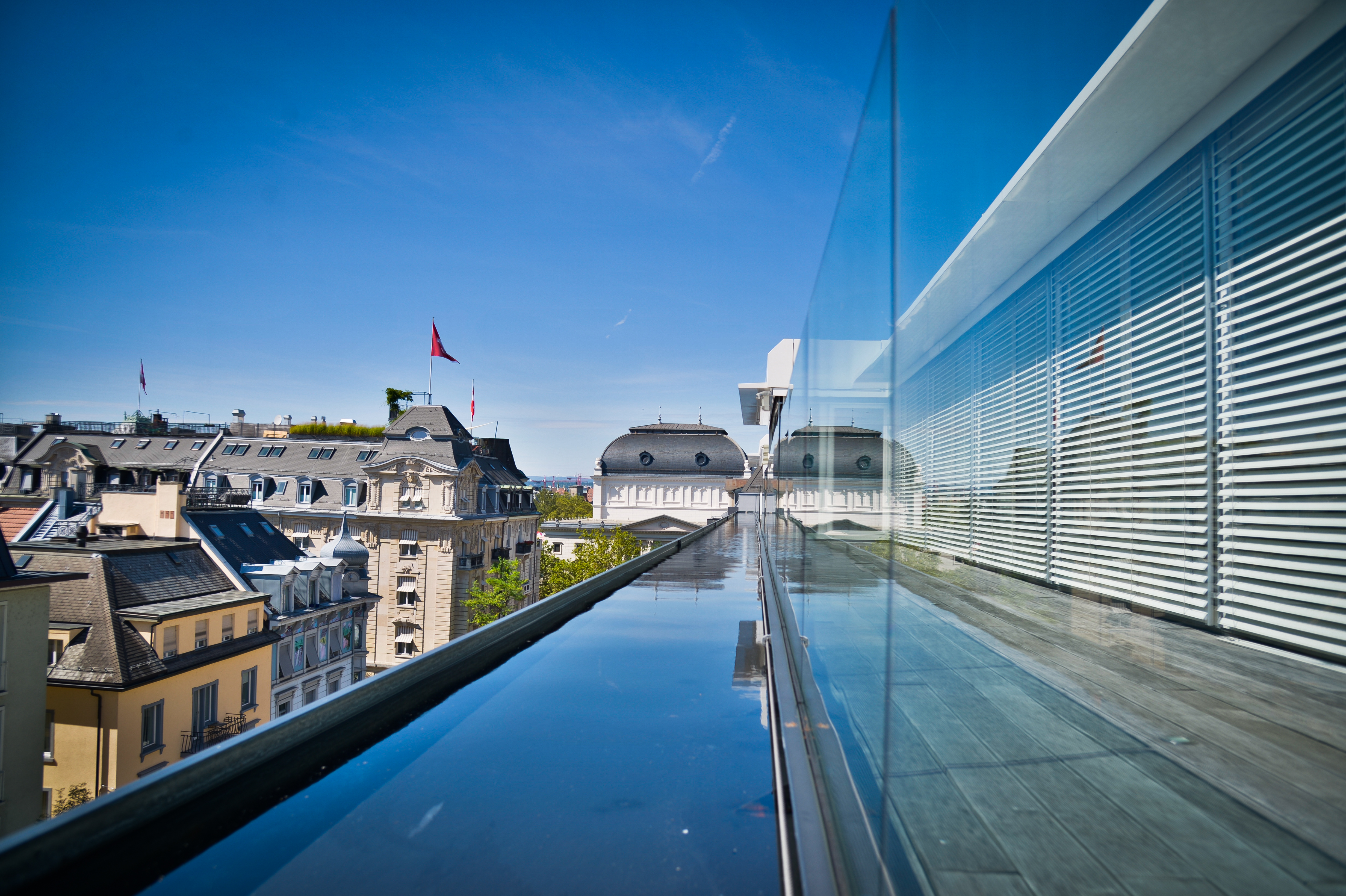 Roof Top Ringier Pressehaus in Zürich